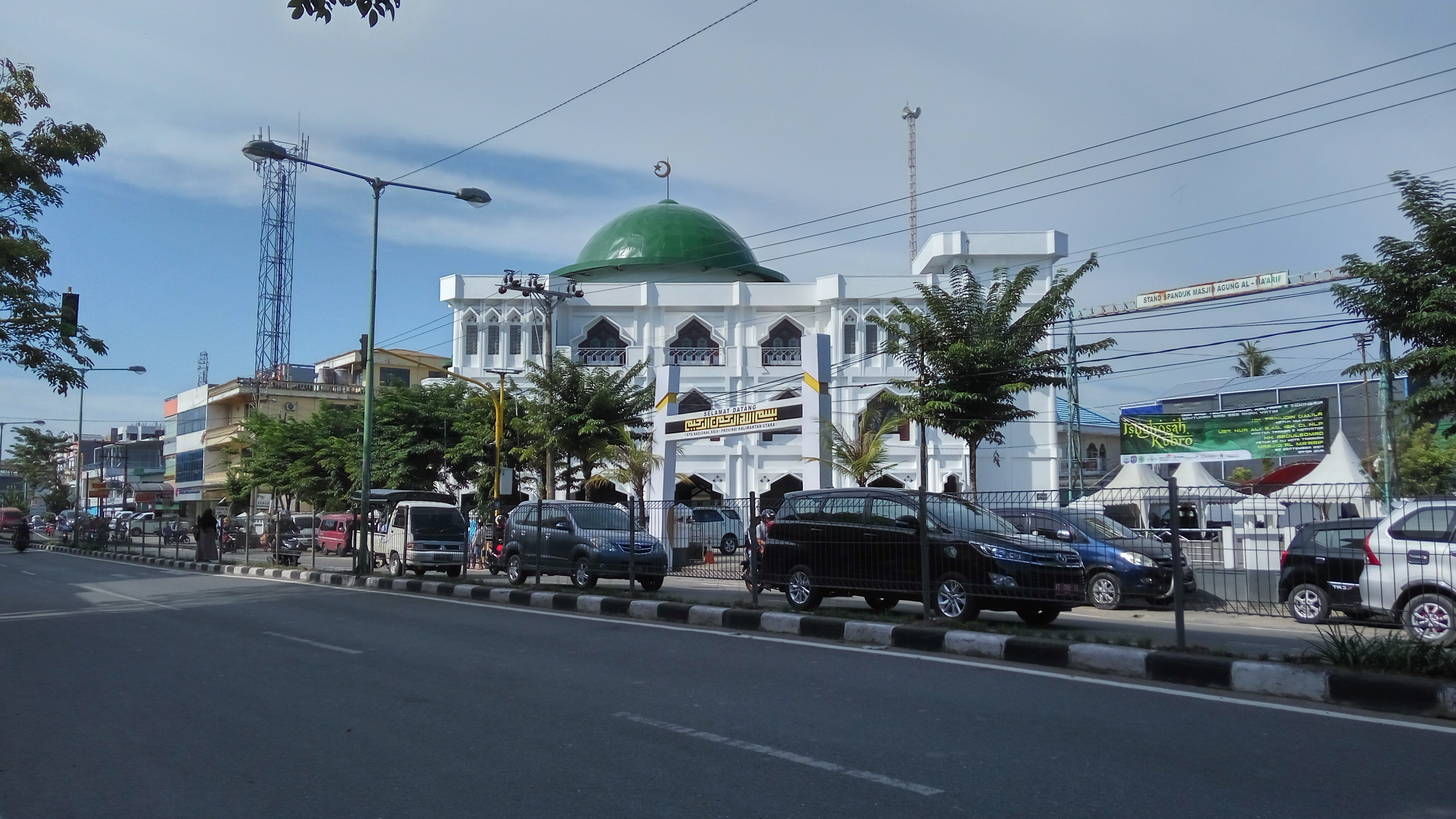 Masjid Agung Tarakan